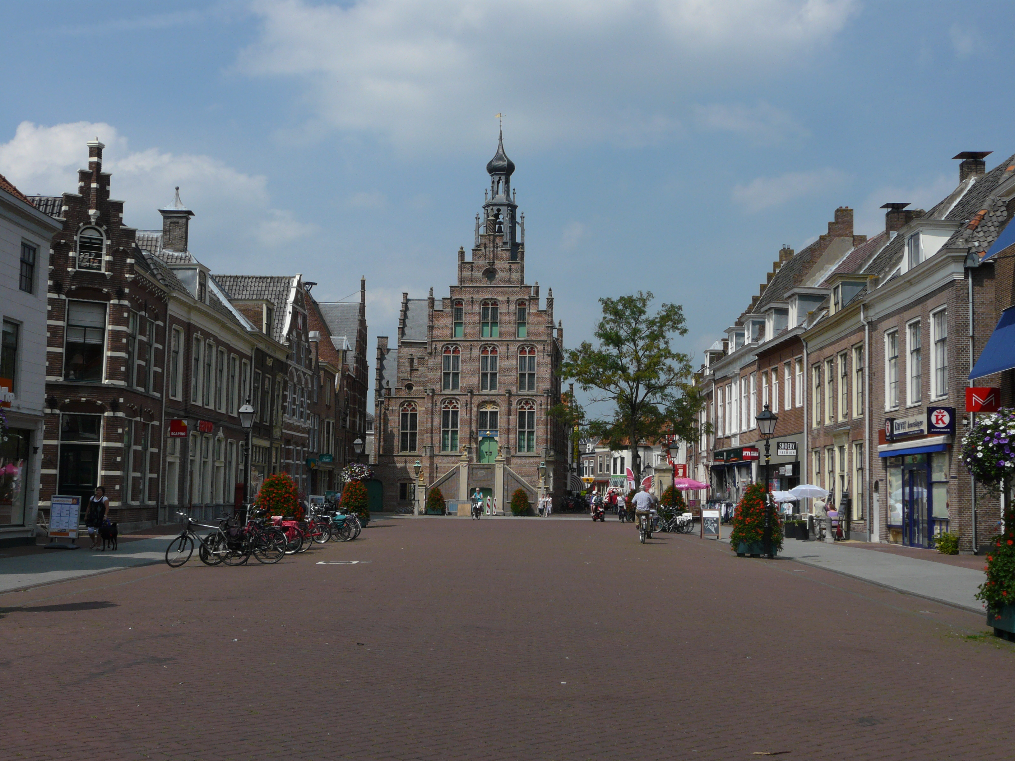 Zicht op een deel van de Markt in het centrum van Culemborg